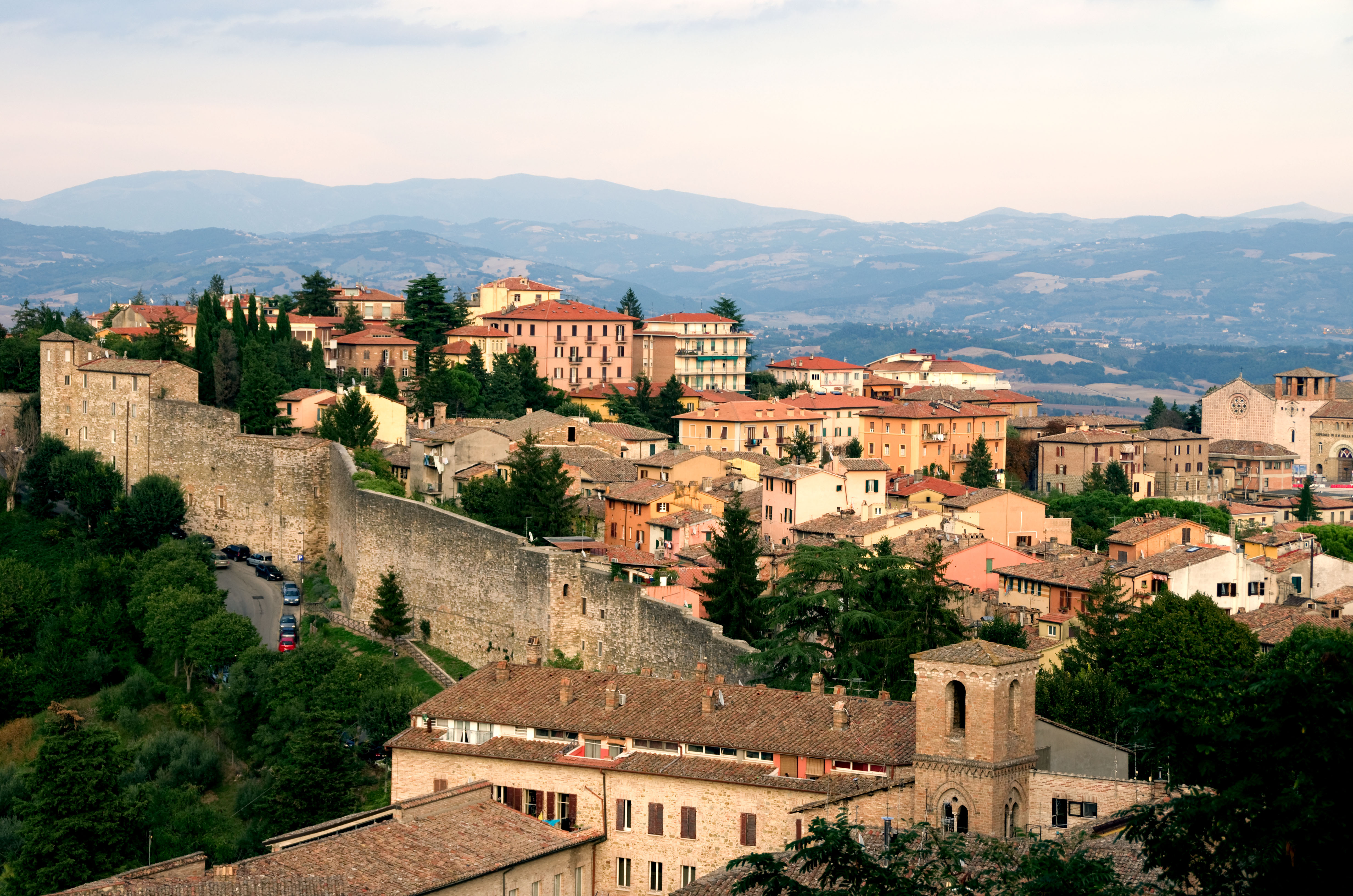 Mura medioevali This is a photo of a monument which is part of cultural heritage of Italy.